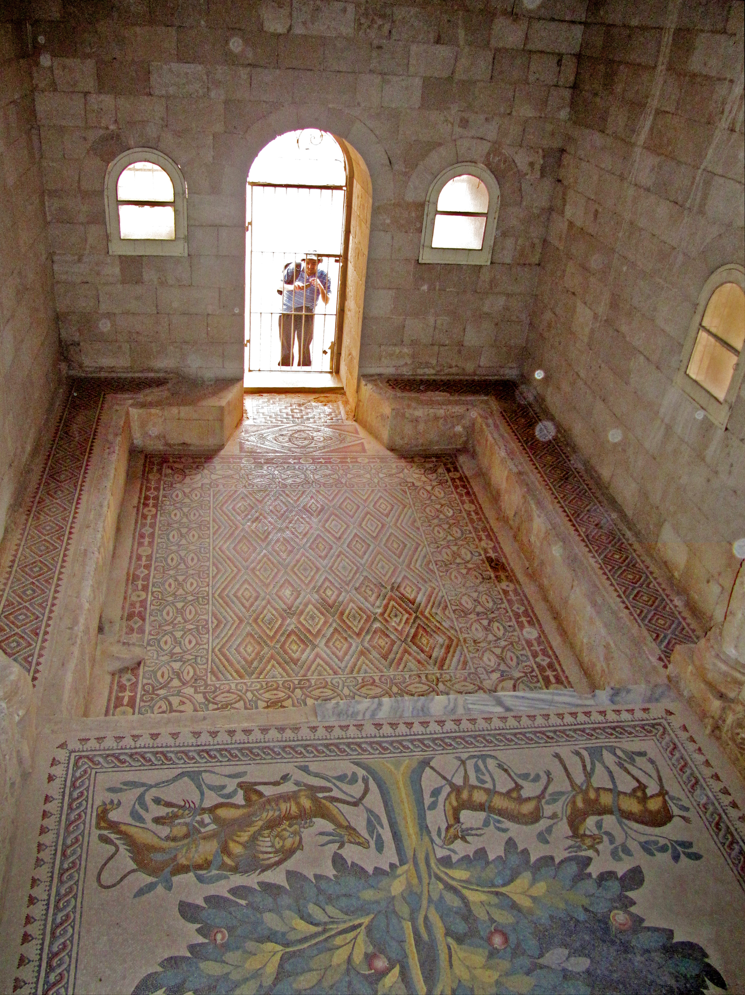 Jericho (more details in the photo's title) יריחו (מידע נוסף בשם הקובץ)